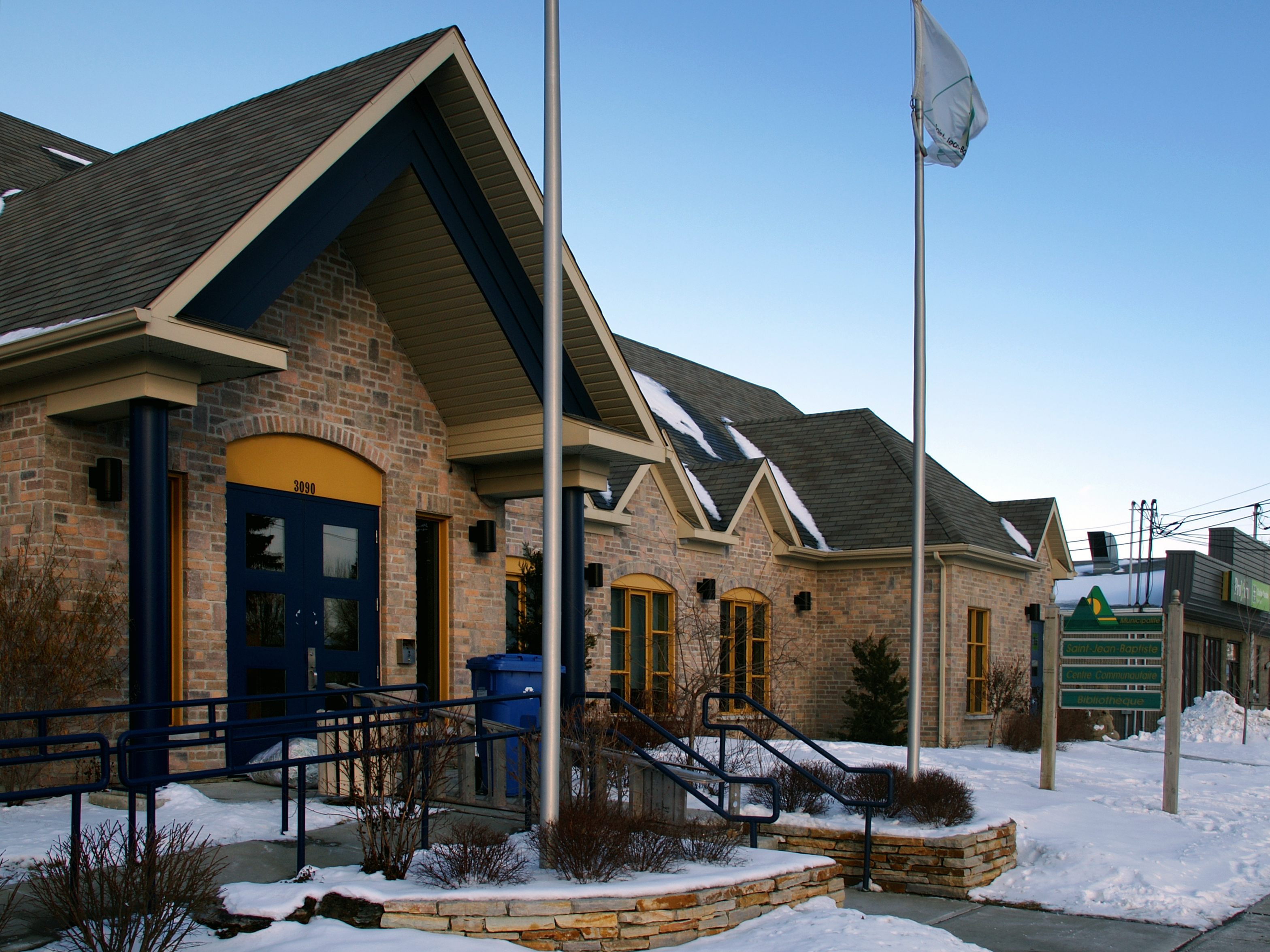 Saint-Jean-Baptiste, Montérégie (Québec) - Le centre communautaire